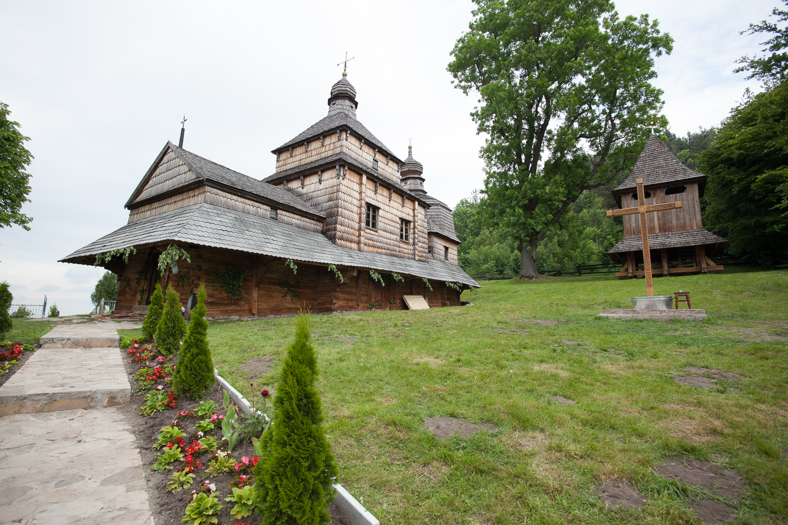 Церква Св.Духа (дер.) 1502 р.